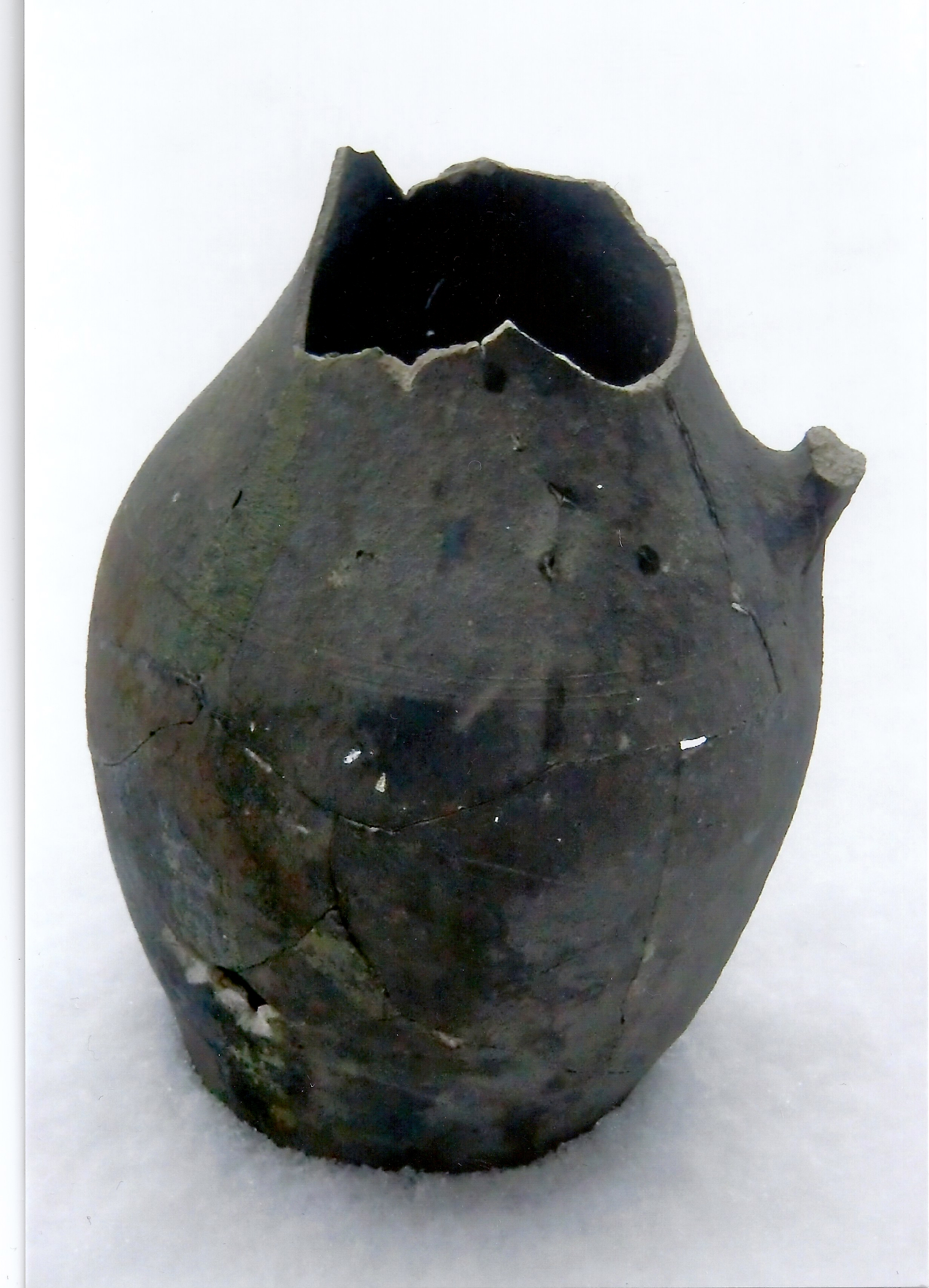 Reduzierend gebrannter, zerscherbter Krug aus Niederbayern / Rottal